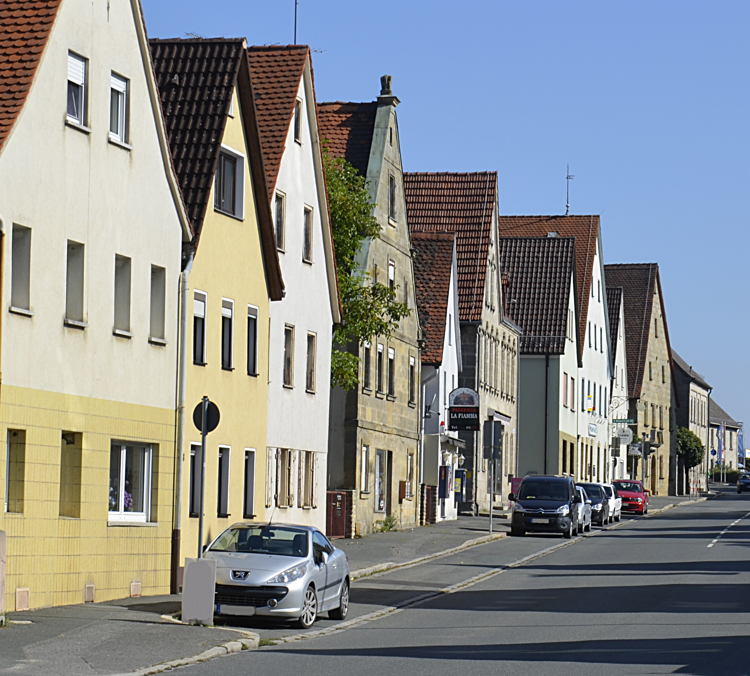 Ortskern EschenauThis is a photograph of an architectural monument.